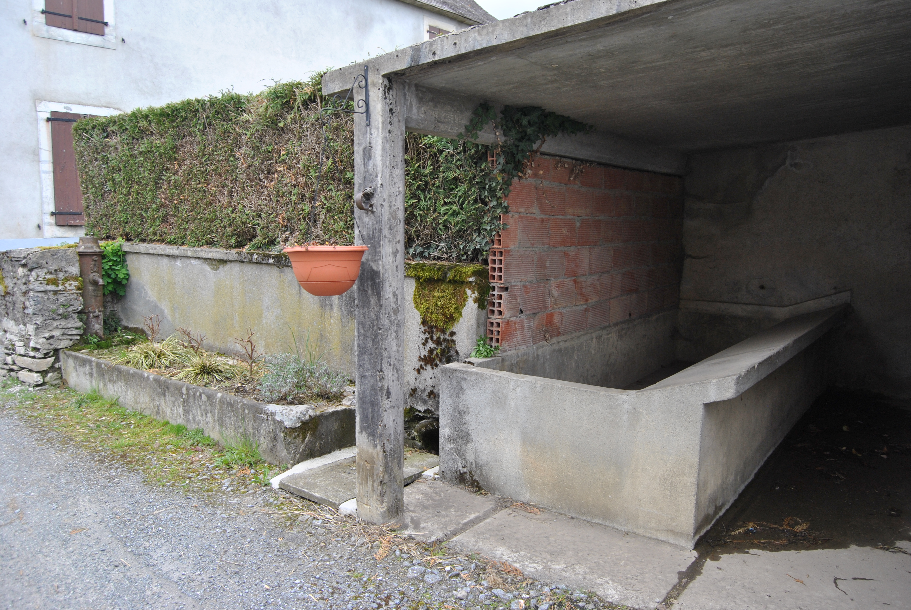 Lavoir Cami deth Espi, à Avezac-Prat-Lahitte (Hautes-Pyrénées)